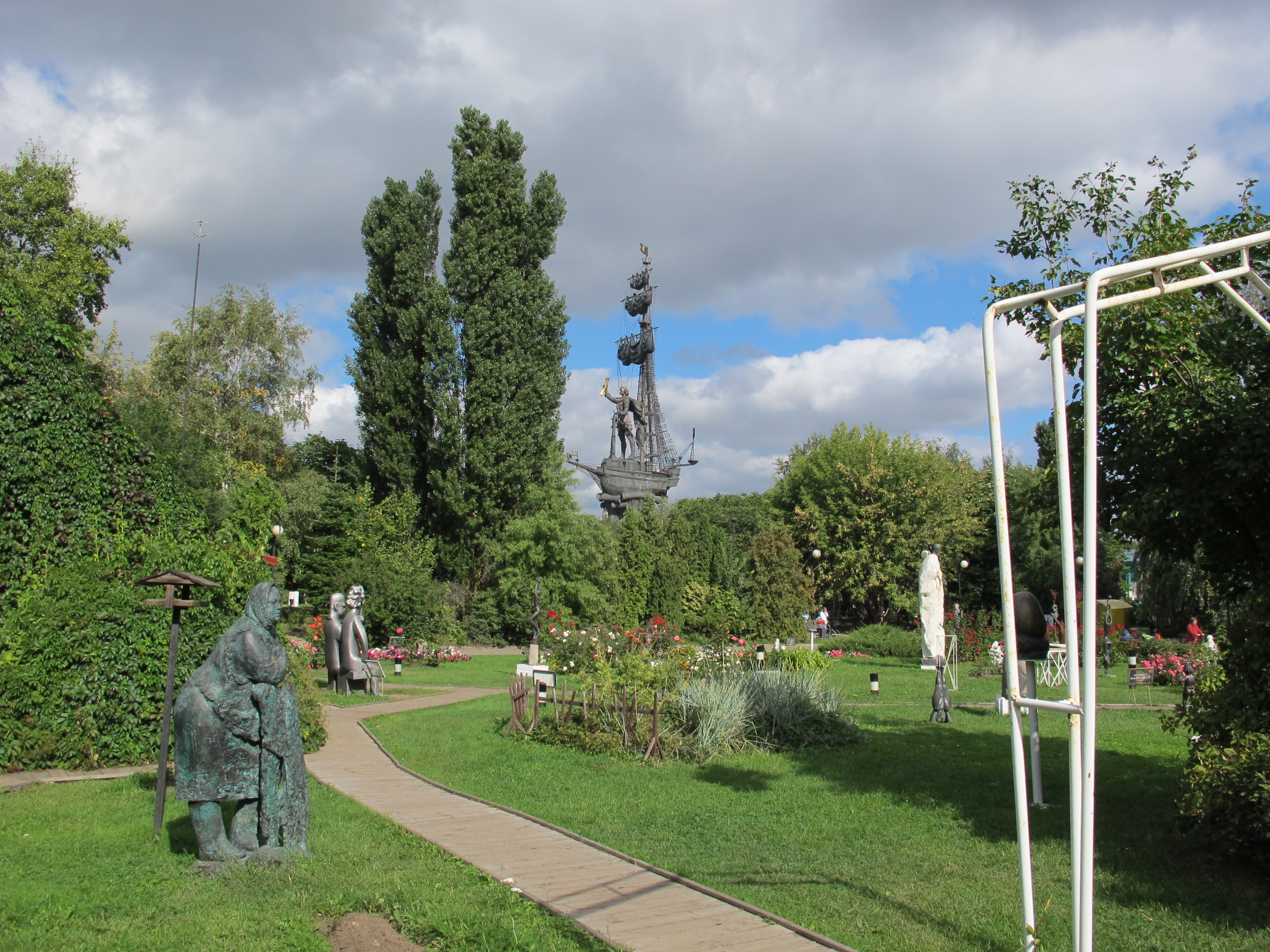 Muzeon Park